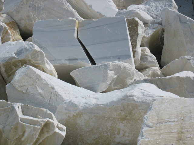 Blöcke von Laaser Marmor